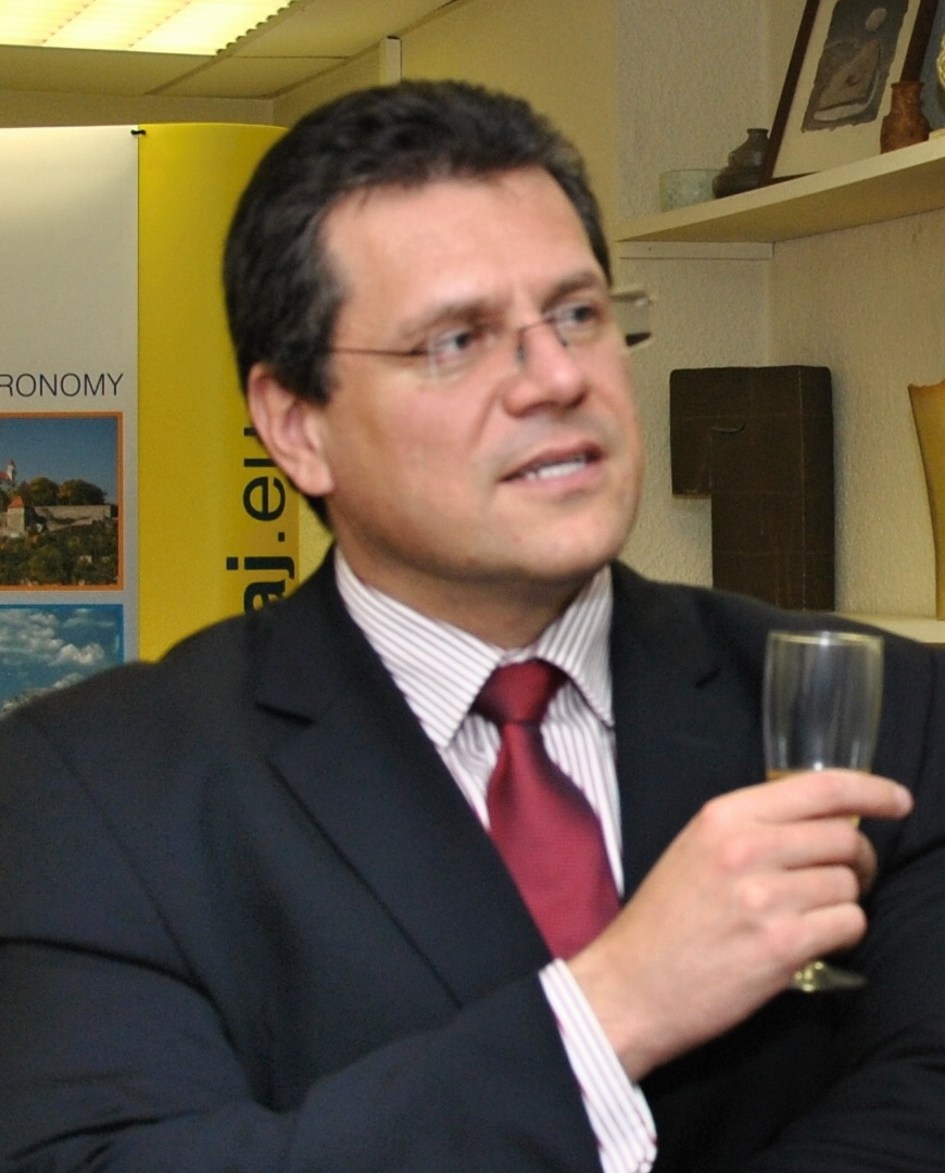 Maroš Šefčovič